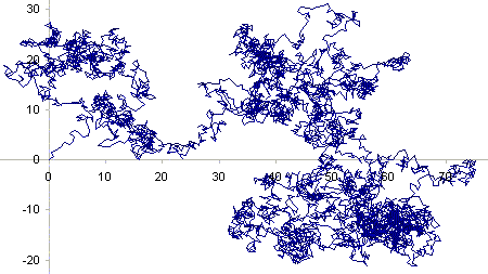 2-dimensionnal brownian mouvement . Auteur : Alexis Monnerot-Dumaine.